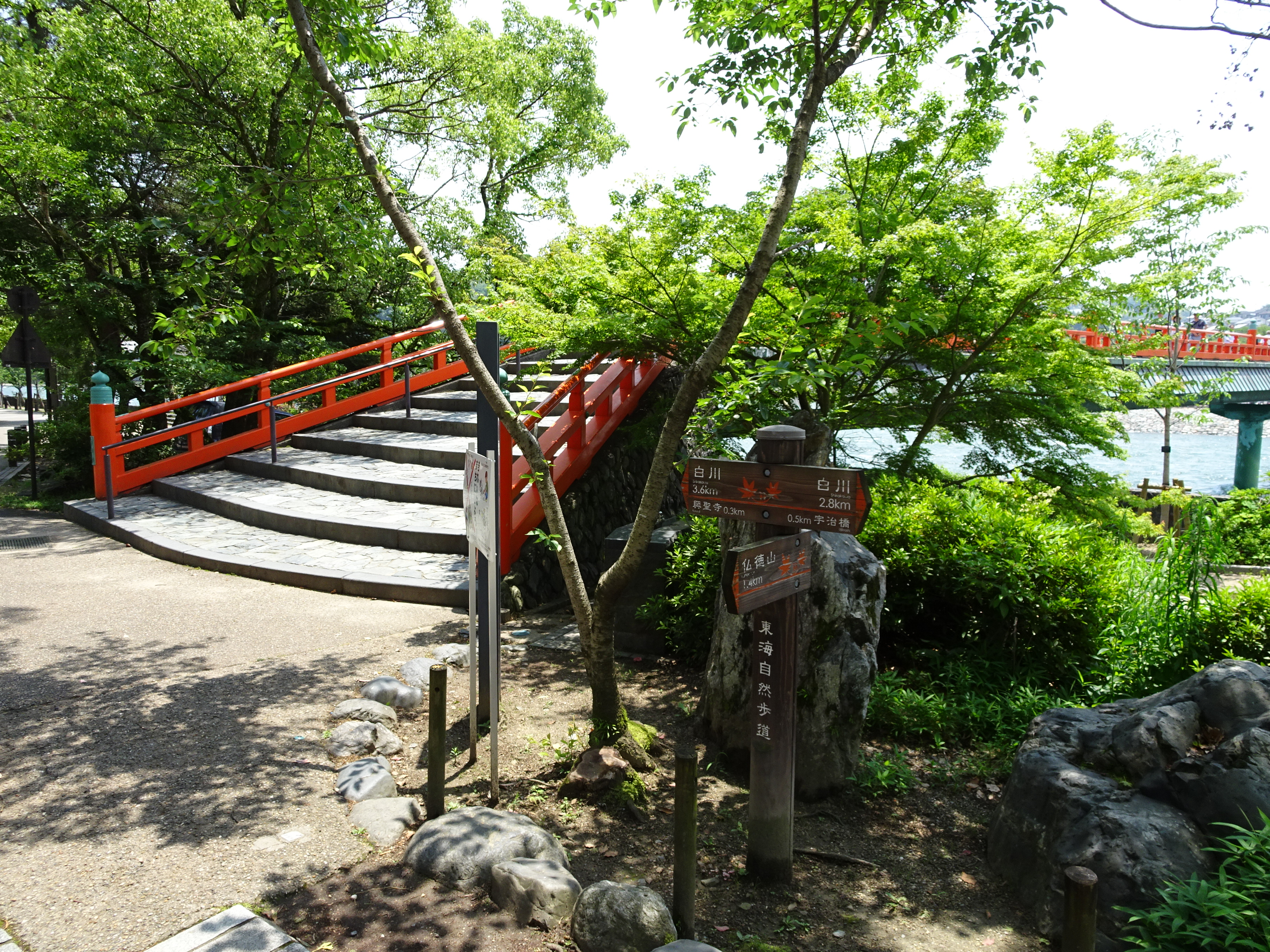 東海自然歩道標柱（宇治市より）